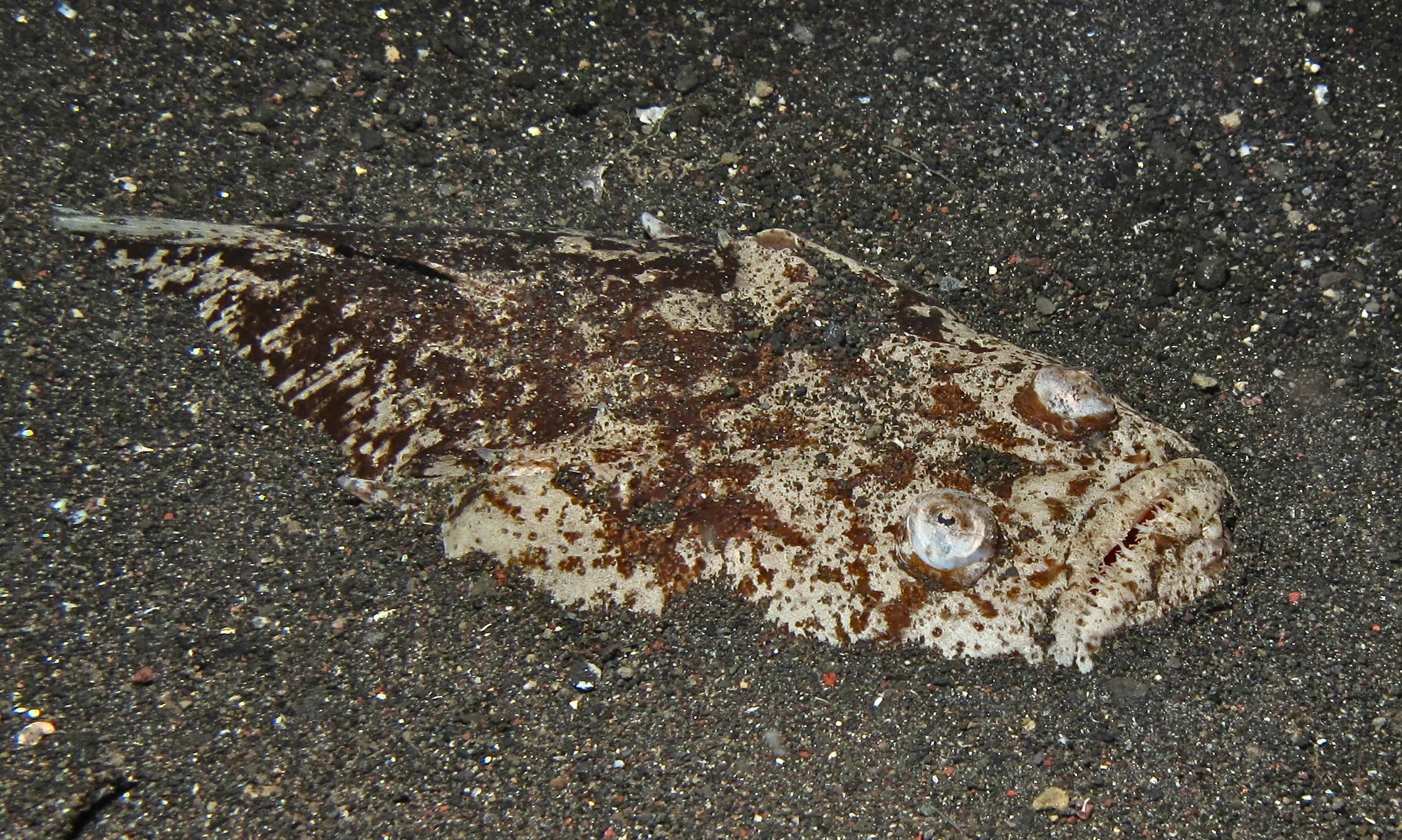 Jahir, Lembeh Strait, Sulawesi, INDONESIA